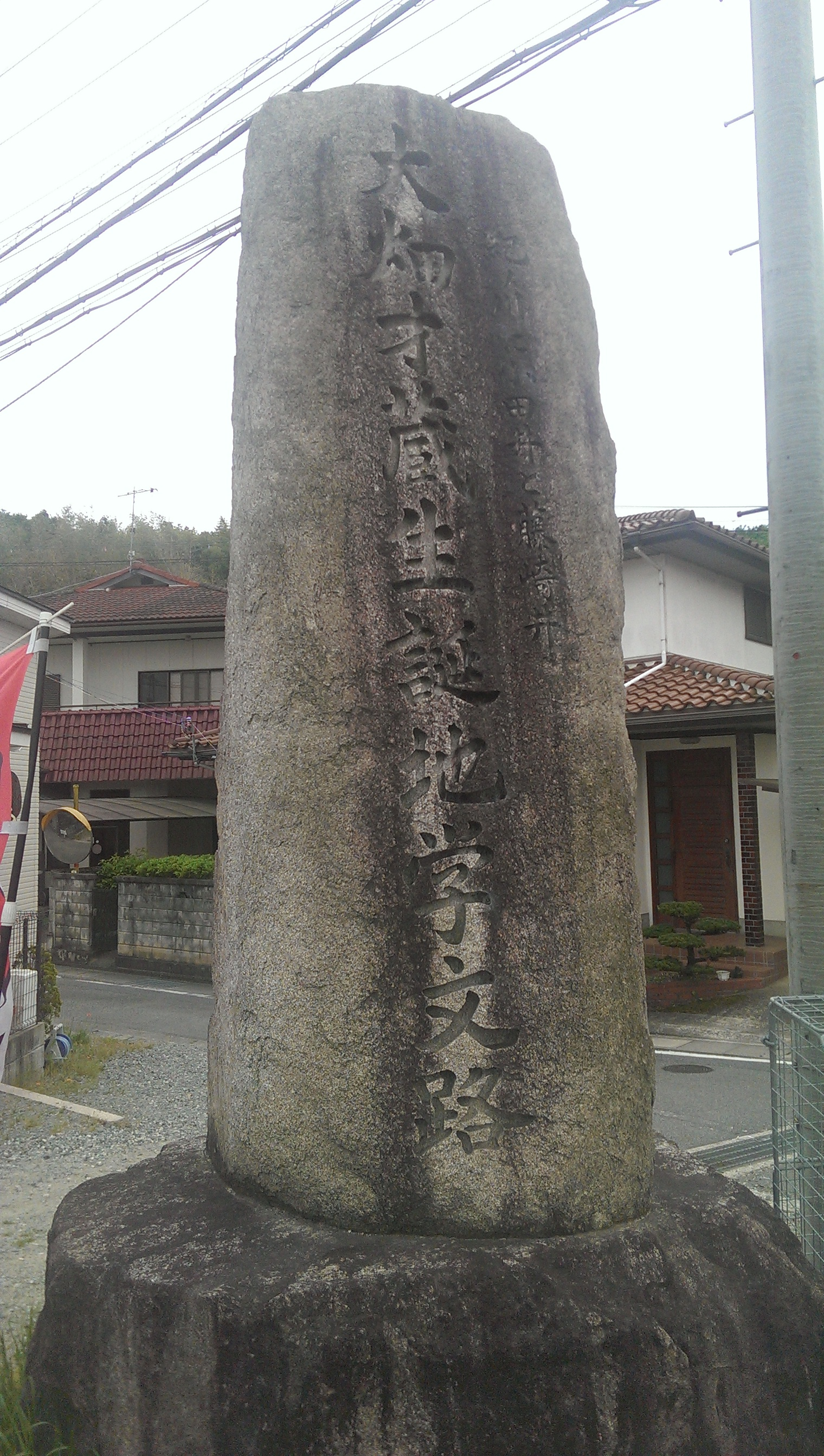 編集者自身による撮影。大畑才蔵生誕碑。国道370側より撮影